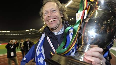 Michel Preud'homme tijdens zijn succesverhaal bij KAA Gent